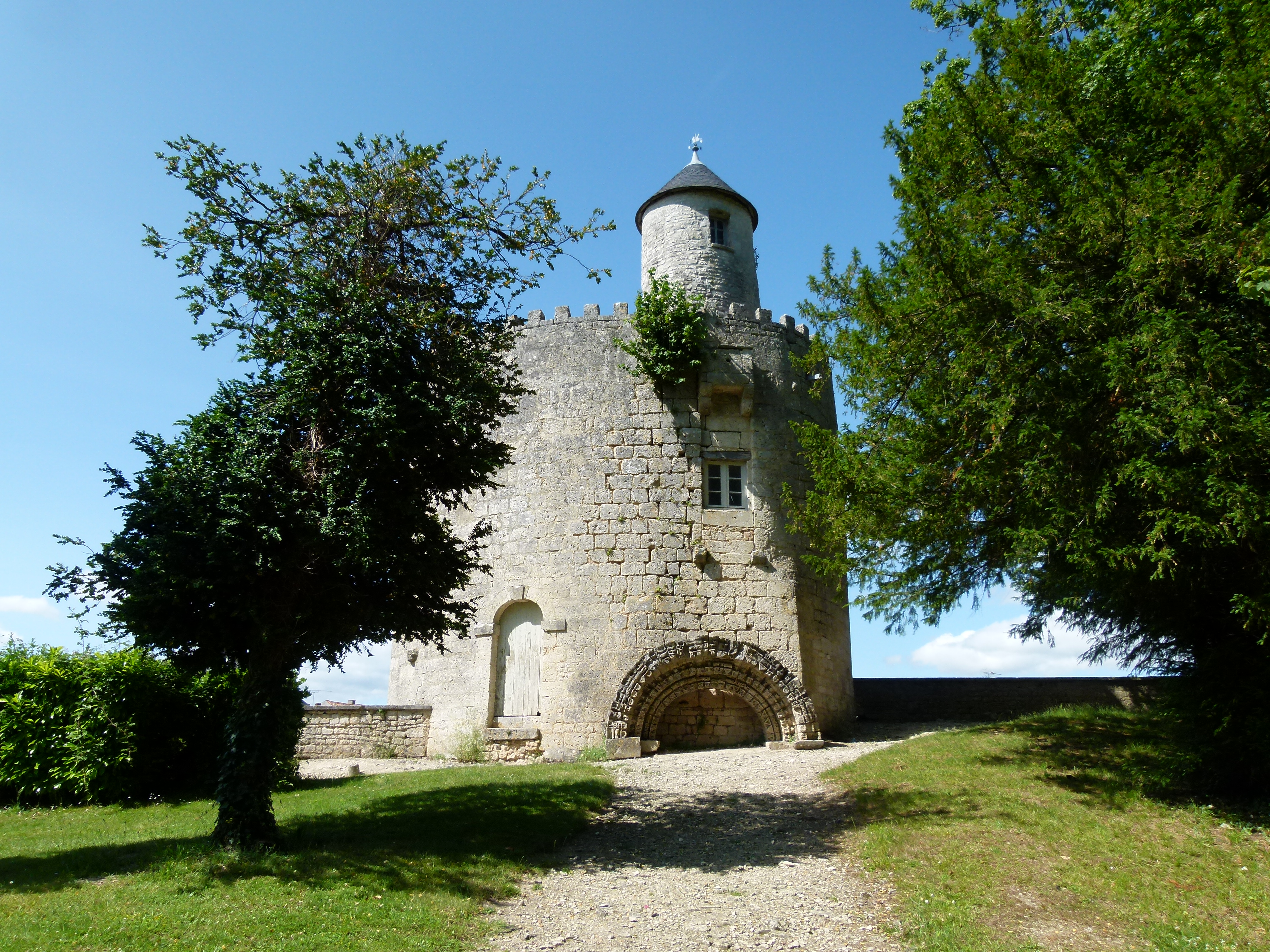 Une des vingt tours qui composent la ceinture fortifiée du château de Surgères.